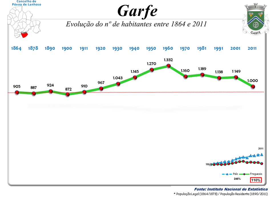 Censos 1864/2011